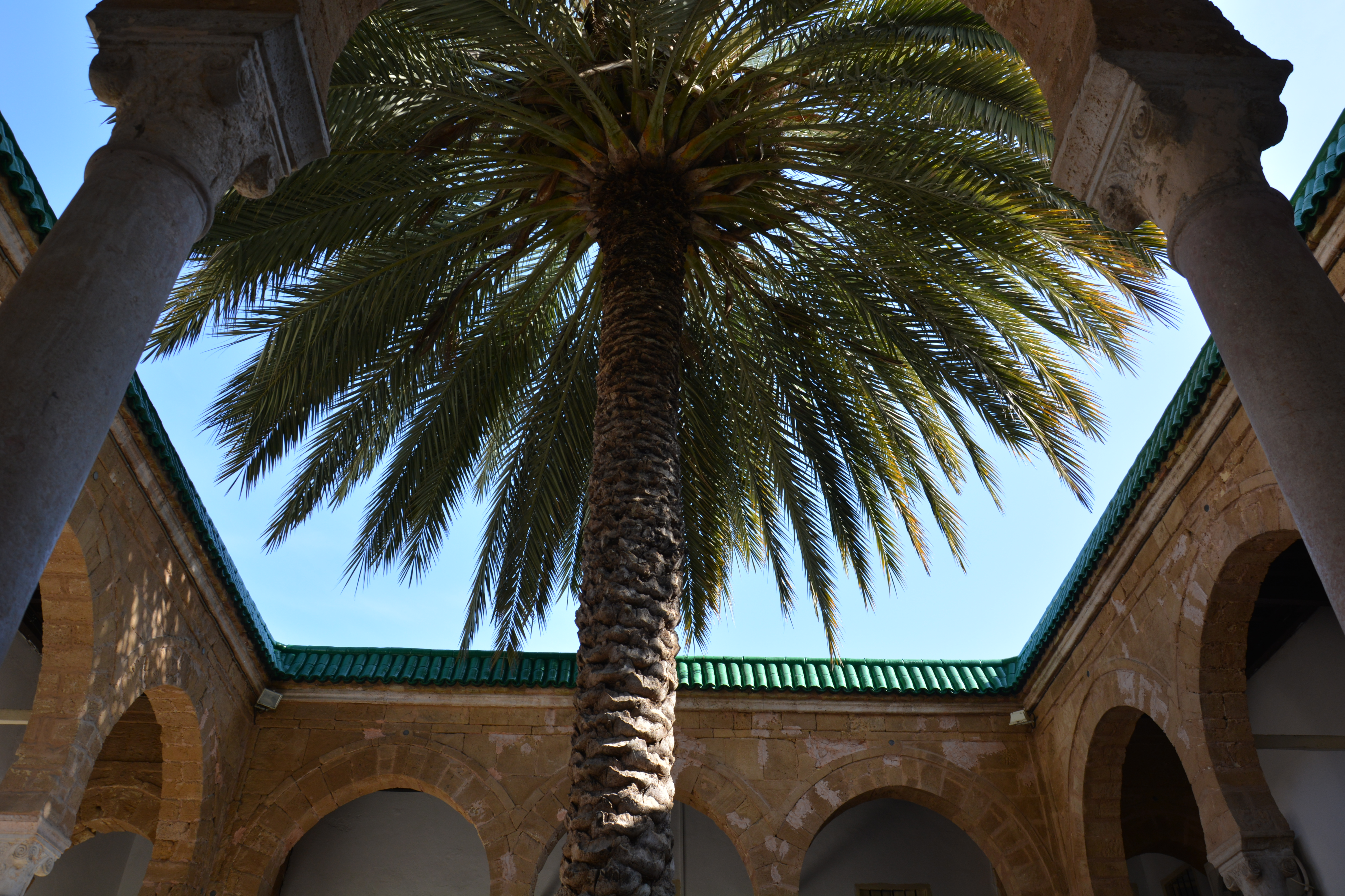 Medersa Ennakhla son nom vient du palmier dans sa cour centrale.